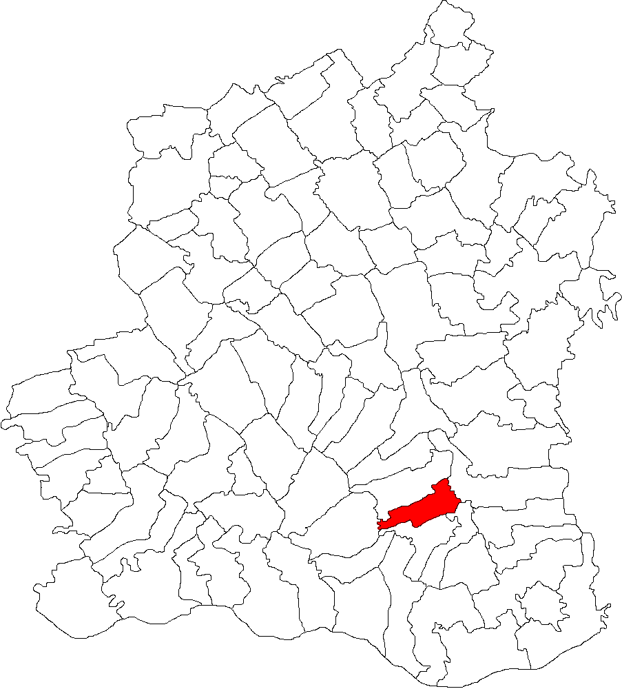 Categorie:Hărţi ale judeţului Teleorman